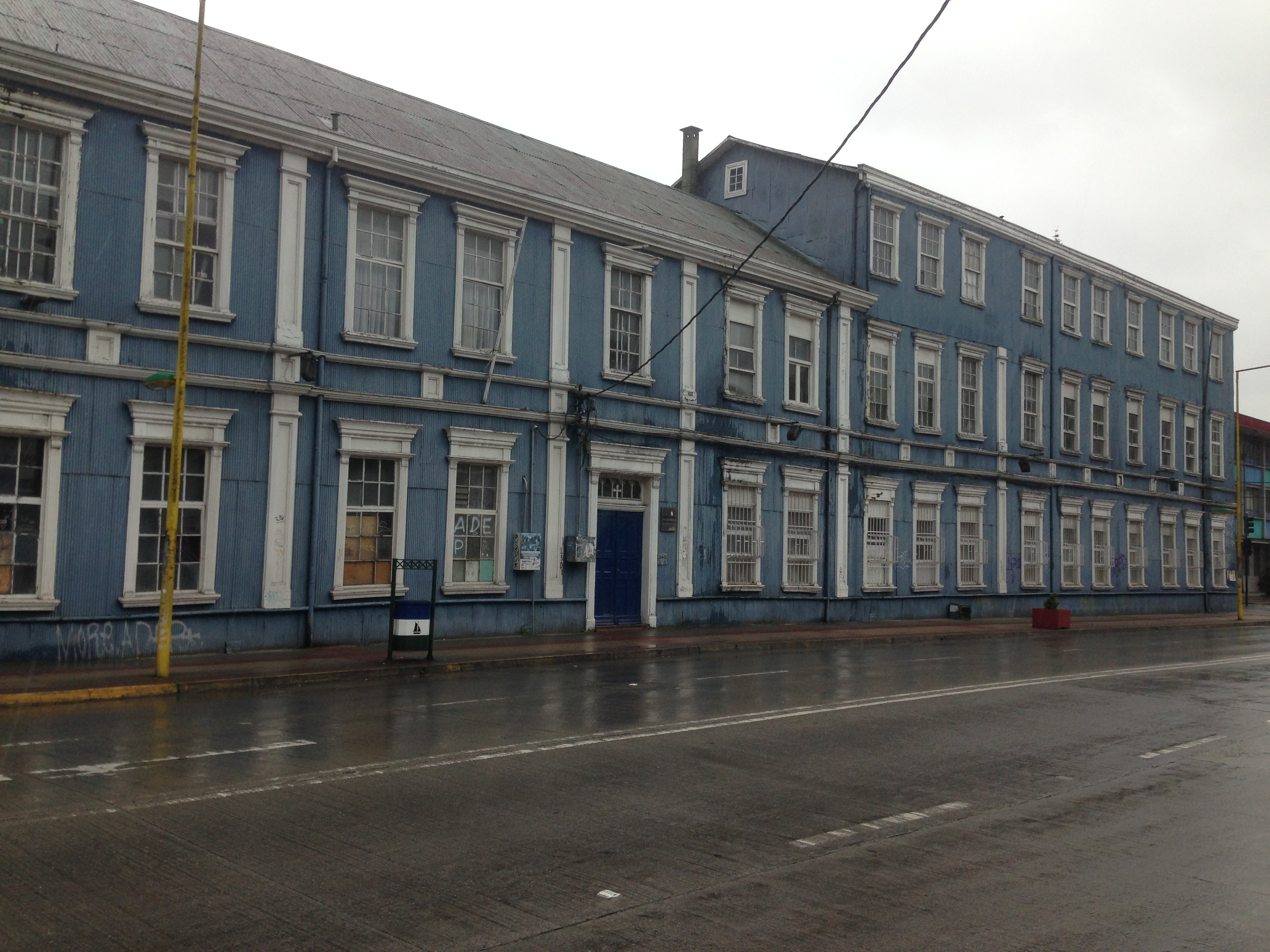 Antiguo Colegio San Francisco Javier de Puerto Montt